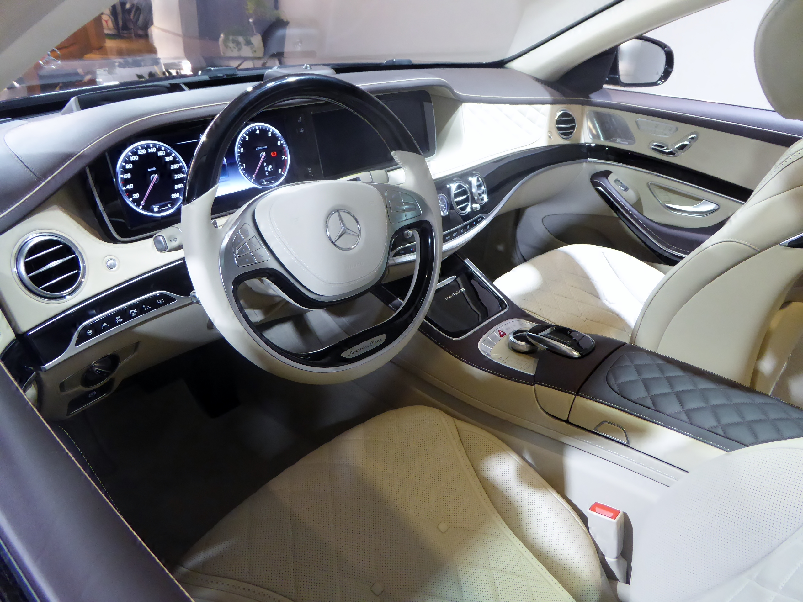 X222型メルセデス・マイバッハS550のインテリアを撮影。